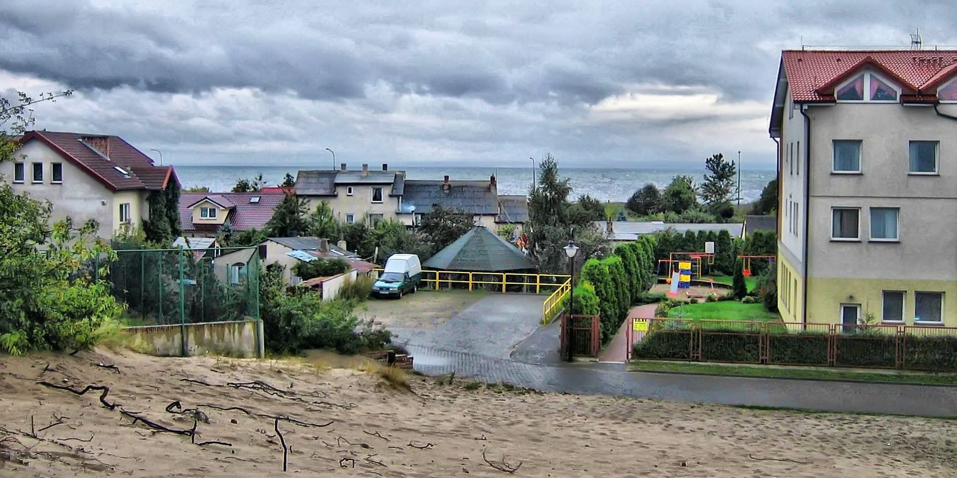 Jastarnia 2007